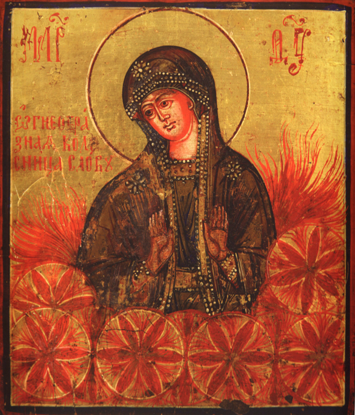 Русская икона «Богородица Огнеобразная колесница Слова» (подпись на иконе — цитата из Акафеста Богородце, песнь 5.). Старообрядческая икона. Частная коллекция. Надпись: "огниев цравна зи лѧкхо ѧ волница воли син ннца слаову".